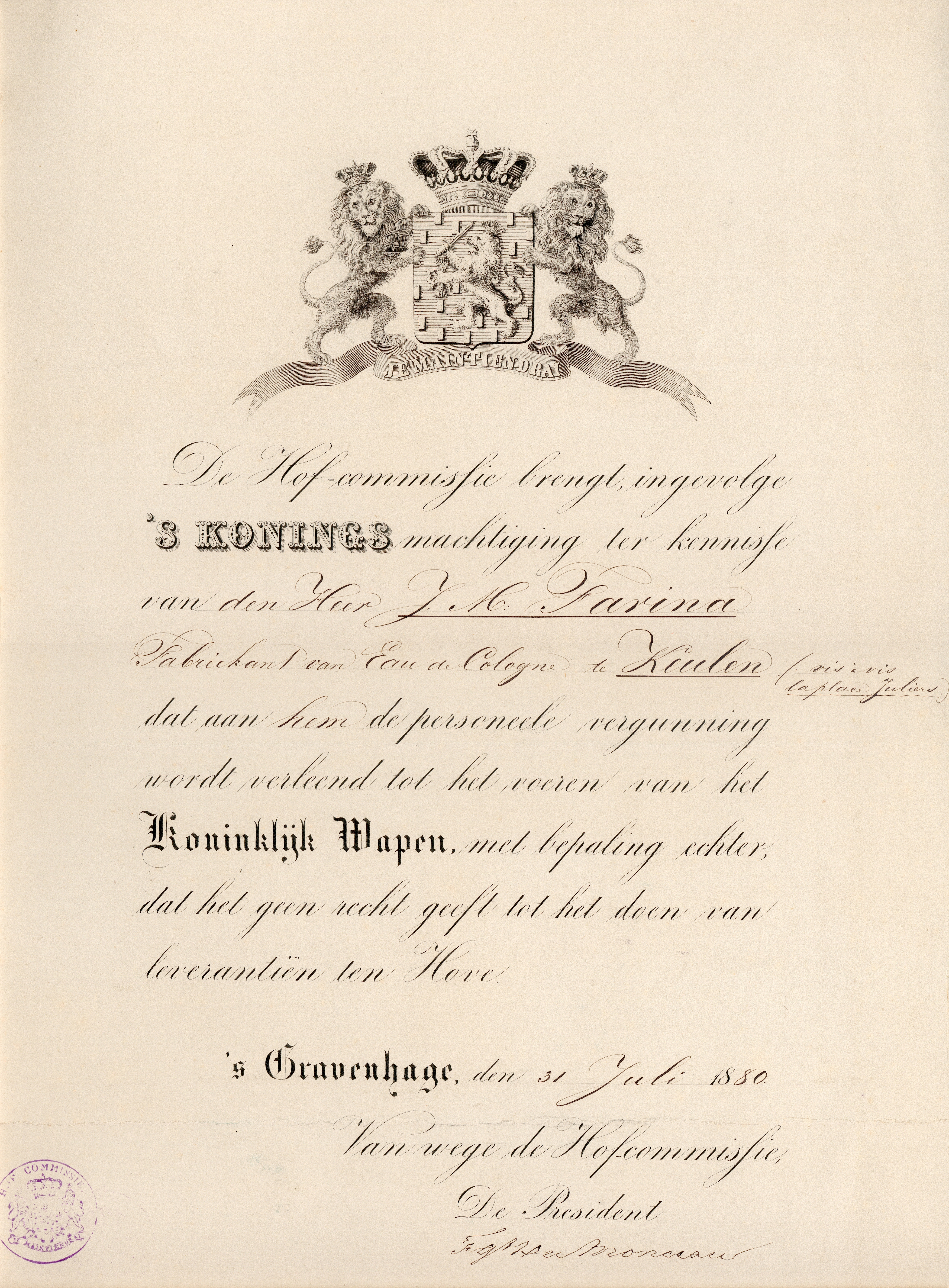 Hoflieferantentitel für Farina vom König der Niederlande